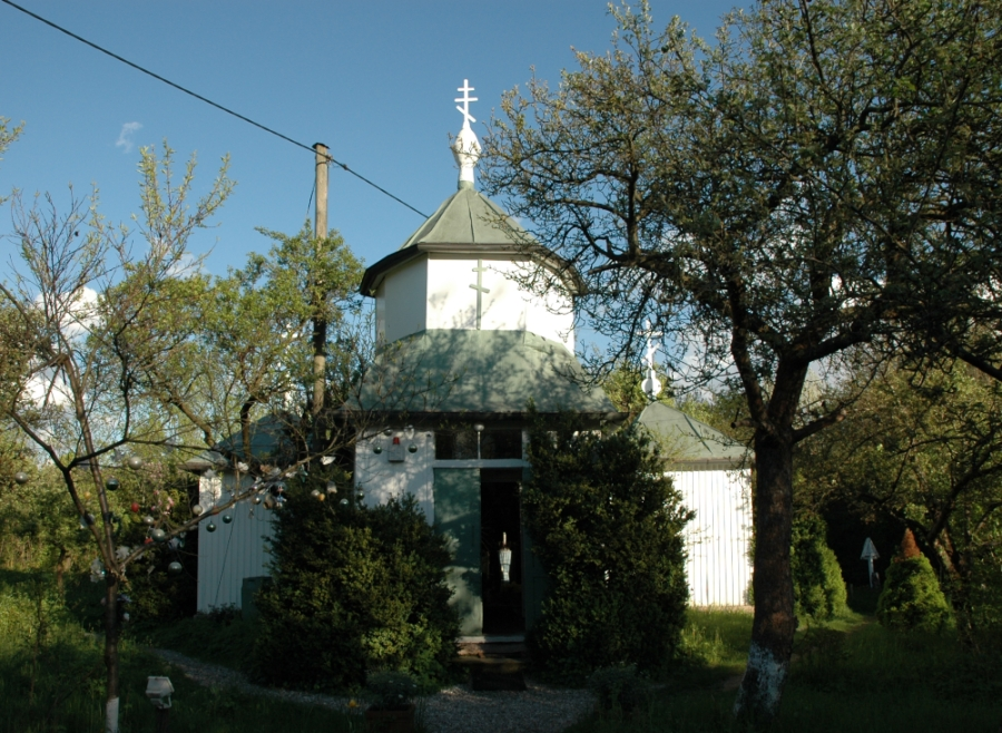 Die Ost-West-Friedenskirche im Olympiapark in München